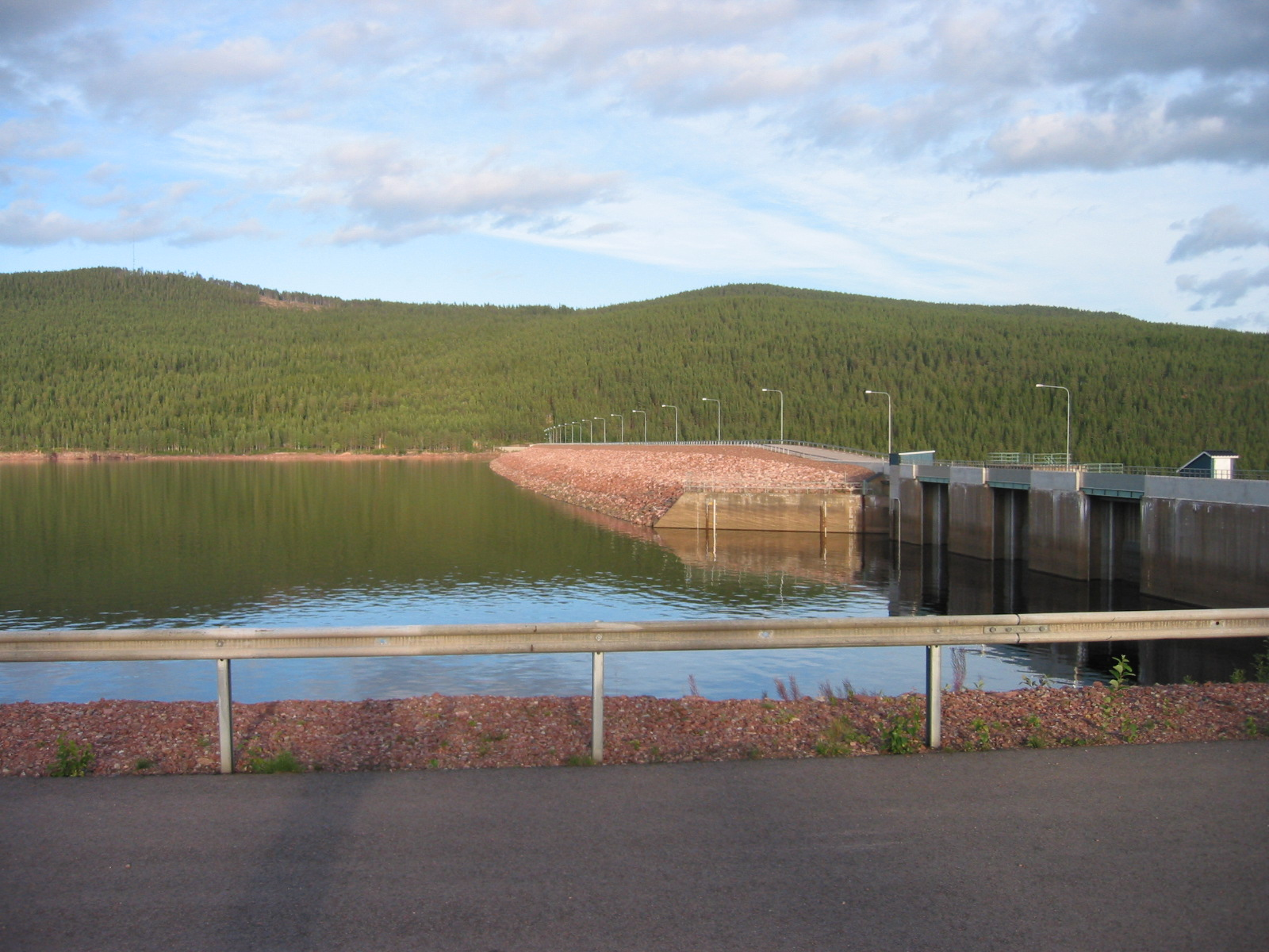 Trängslet dam in Älvdalen, Sweden. Looking at the reservoir.